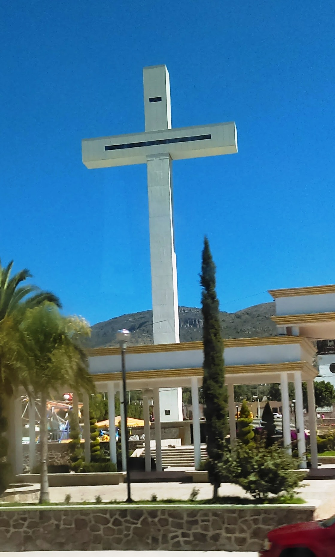 Cruz Monumental de El Arenal, Hidalgo